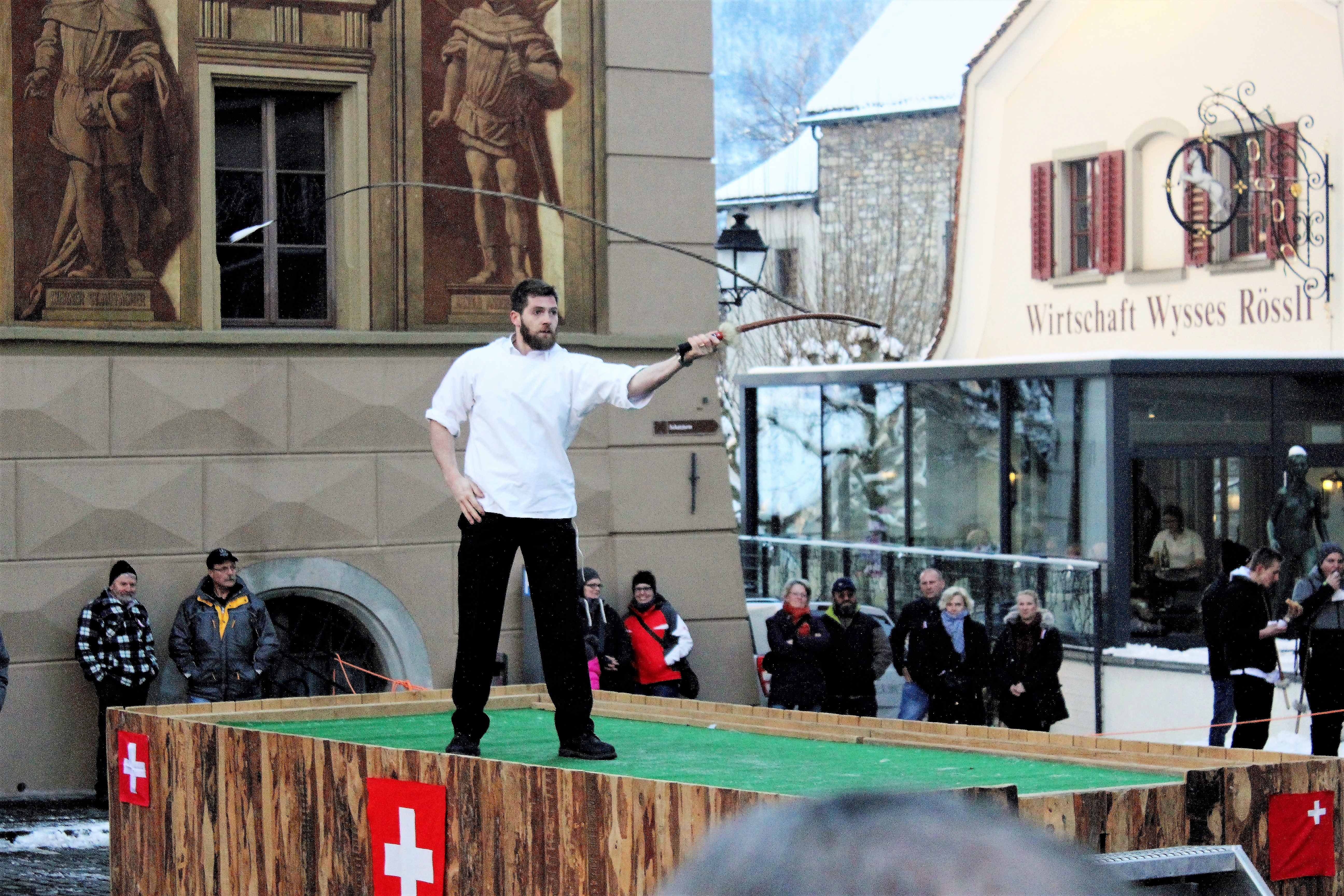 Ein Teilnehmer des Priis-Chlepfe beim Geislechlepfen auf der Bühne neben dem Hotel Wysses Rössli und dem Rathaus in Schwyz.